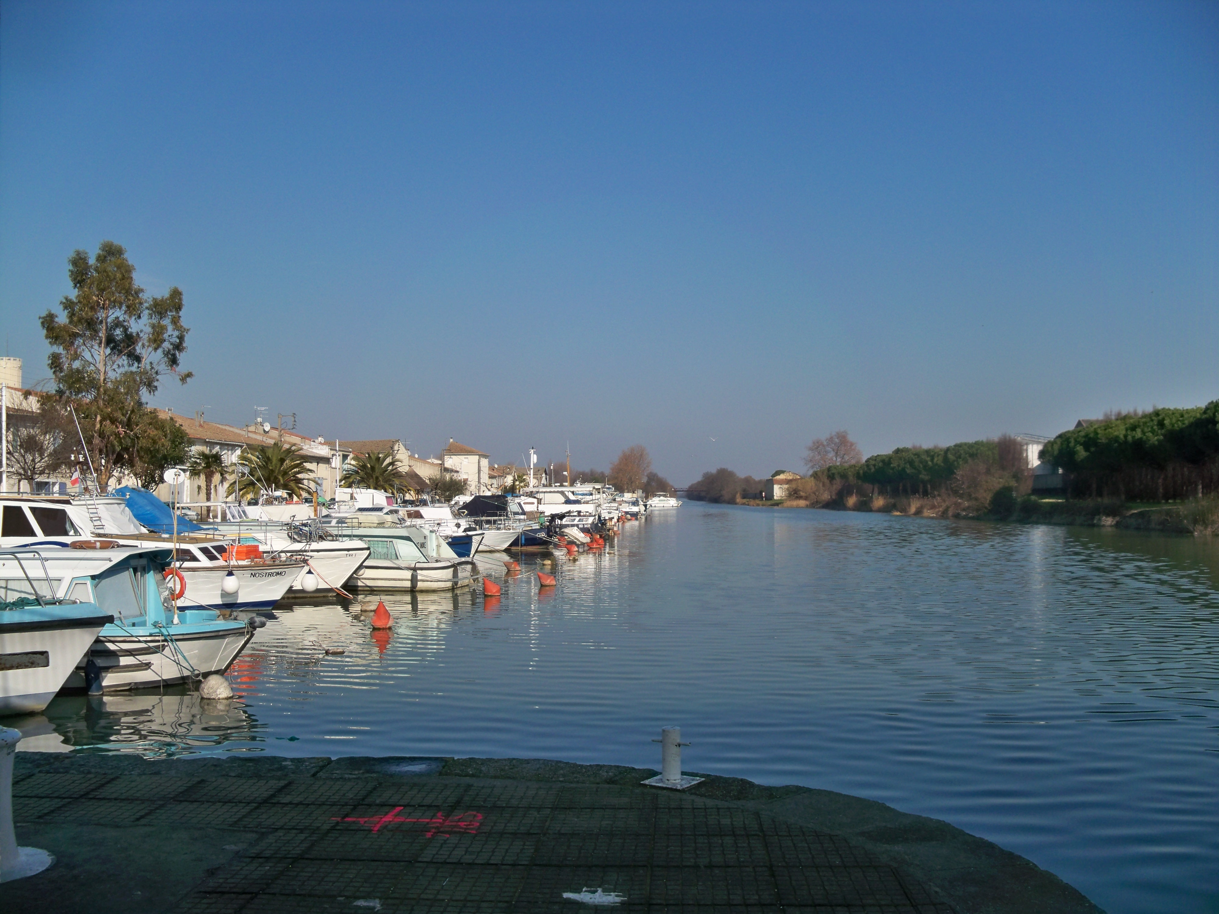 Le canal du Rhône à Sète à Saint Gilles (30)